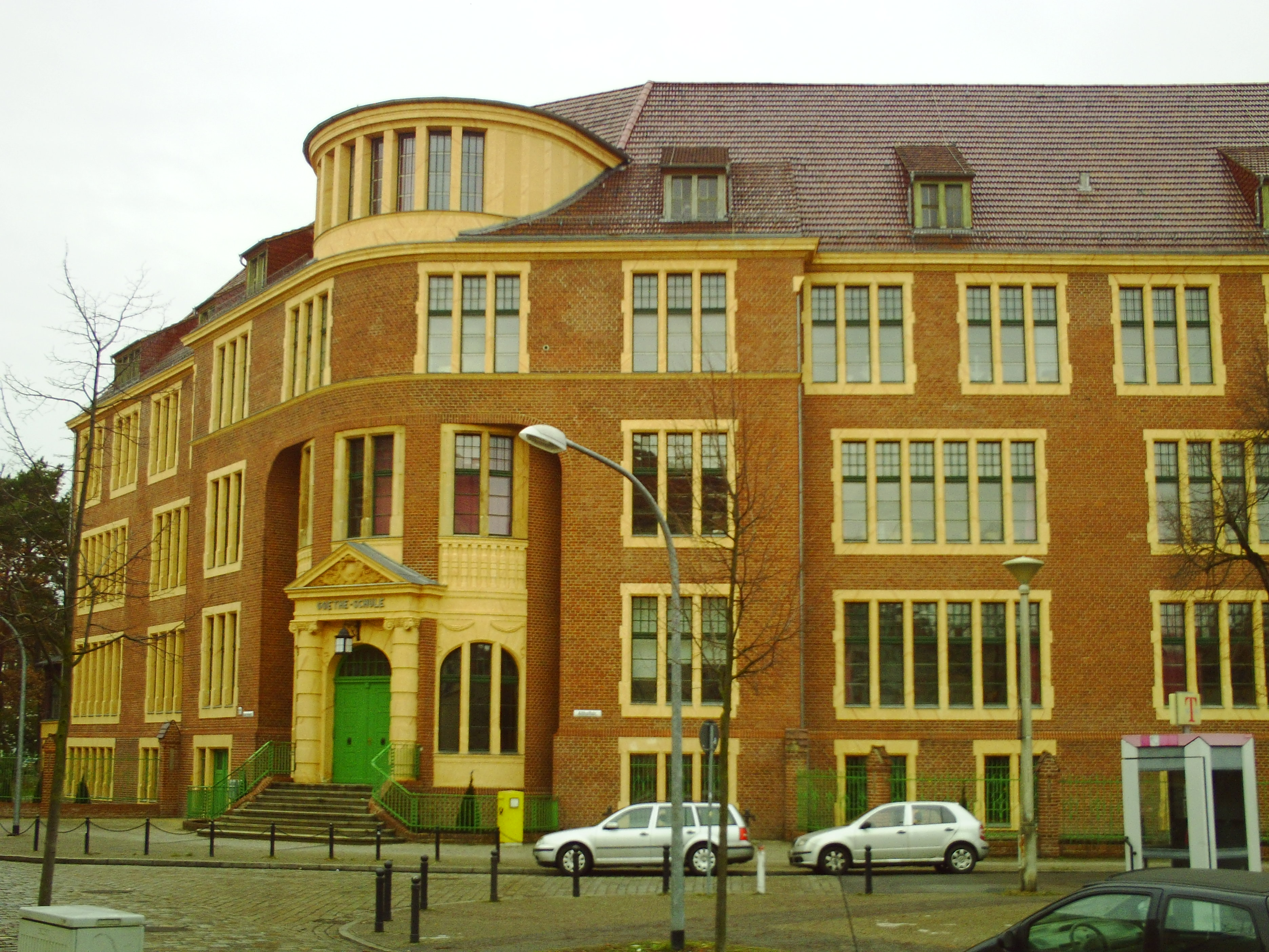 Beethoven-Schule in Potsdam-Babelsberg auf der Kopernikusstraße,ehemaliges Althoff-Gymnasium, seit 2012 Bertha-von-Suttner-Gymnasium.